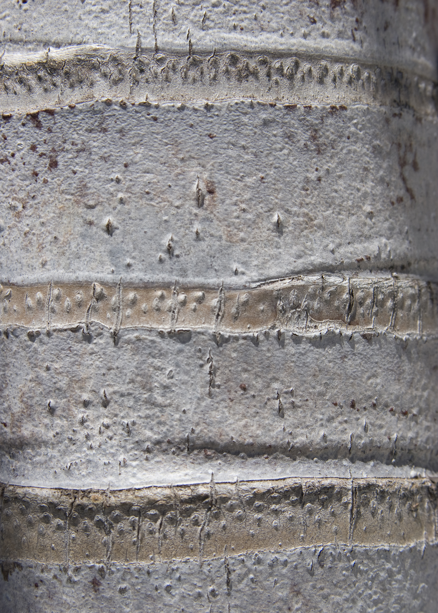 Adonidia merrillii trunk